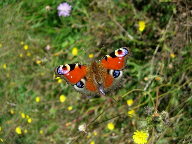 Inachis io